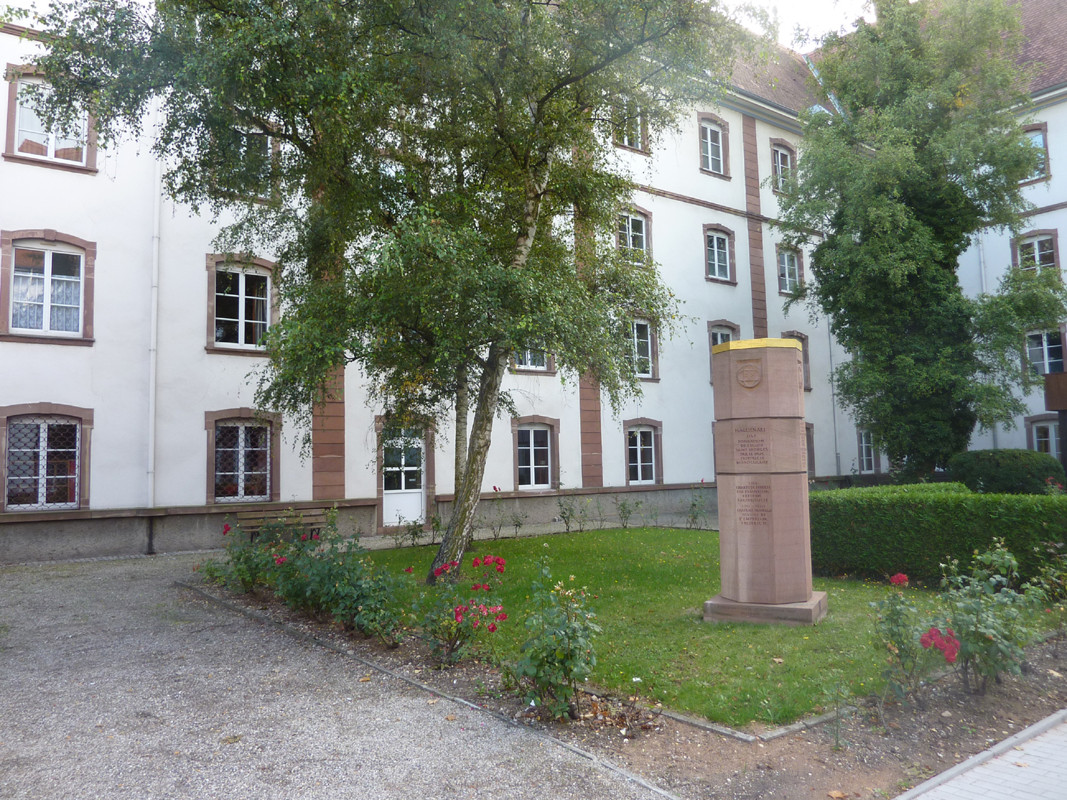 Hagenau - Stauferstele im Innenhof der Maison de Retraite. Die im Jahr 2006 ursprünglich in der Rue de la Moder 4b aufgestellte Stauferstele steht seit September 2012 in der Rue du Chateau 1 im Innenhof der Maison de Retraite, wo sich früher die staufische Kaiserpfalz befand.